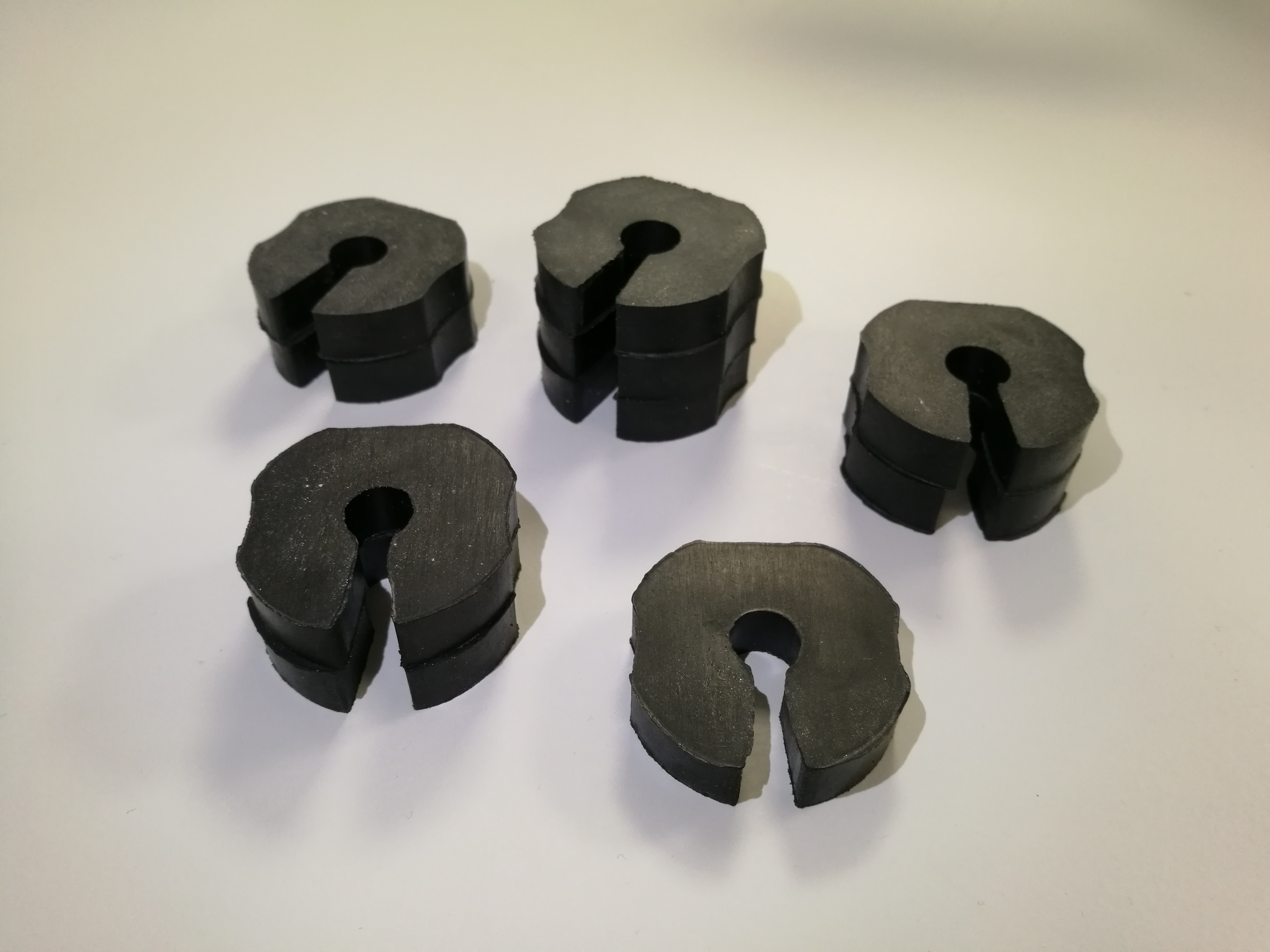 Federwegsbegrenzer können an der Kolbenstange eines Stoßdämpfers angebracht werden.